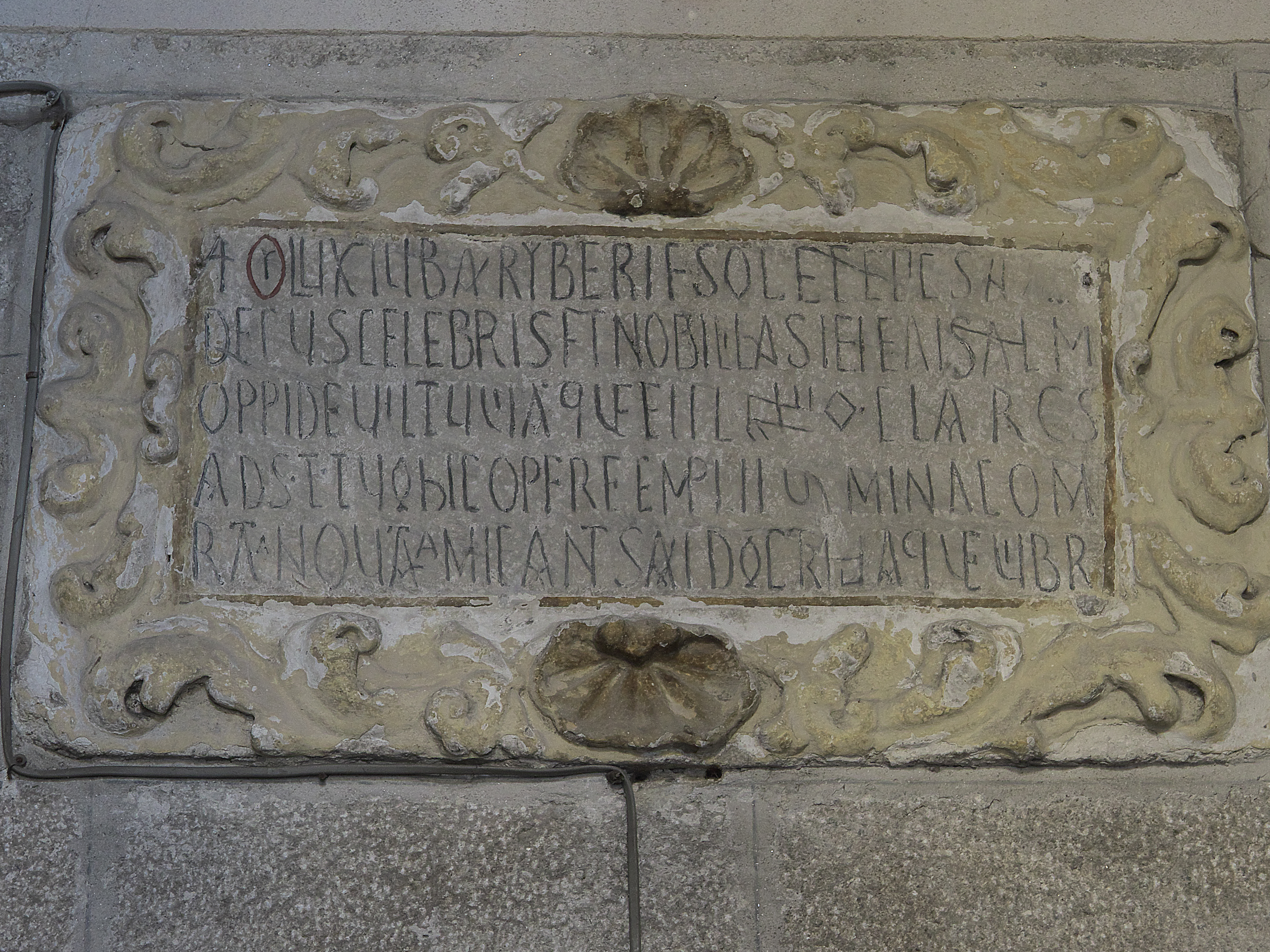 OH LUZ, LUCERO DE IBERIA, SOL Y OBISPO SANTO, / CÉLEBRE DECORO Y NOBLEZA DE LINAJE ALMO, / EN LA CIUDAD POR LA FIGURA Y LA VIDA Y LA ELOCUENCIA BRILLAS, / ESTÁS AQUI PRESENTE Y EN TU OBRA COMPLETAS LOS REMATES / ASEGURADOS, RENOVADOS LUCEN BASTANTE Y VIBRAN DE DOCTRINA. El obispo Odoario restaura la basílica de Lugo (ca. 750-755), cumple así los retos de Alfonso I de Asturias (693-757). Este importantísimo recuperado e incompleto registro, placa conmemorativa o epitafio, nos informa de las virtudes del obispo y de la feliz reconstrucción del templo.